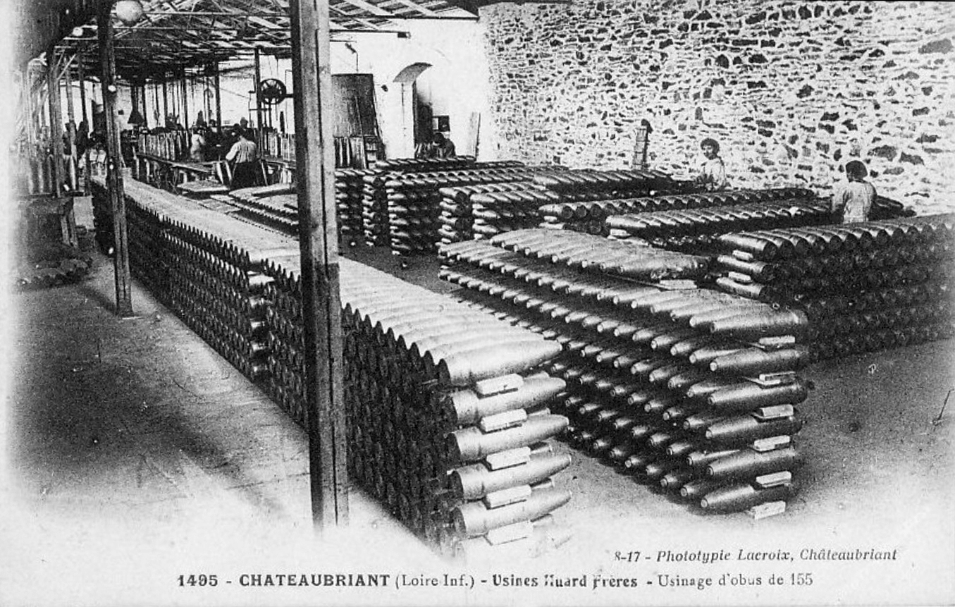 A495 - Châteaubriant (Loir-Inf.) - Usines Huard Frères - Usinage d'obus de 155.